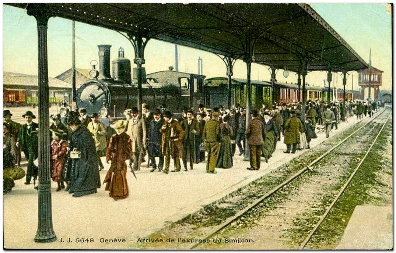 Ankunft des Schnellzuges vom Simplon im Bahnhof Genève-Cornavin. An der Spitze des eingetroffenen Zuges steht eine Gemischtzuglokomotive des Typs B 3/4 („Mogul“) der früheren Jura-Simplon-Bahn (JS).